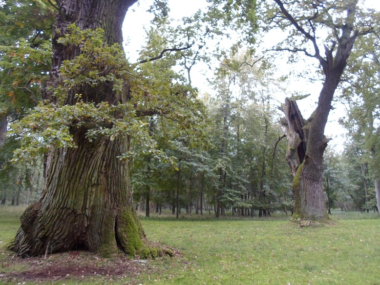 Die Ivenacker Stieleichen (Naturdenkmal), auch Tausendjährige Eichen genannt, gehören zu den ältesten Europas. Sie sollen 500 bis knapp 1000 Jahre alt sein. Die mächtigste der Ivenacker Eichen hat einen Stammumfang in Brusthöhe von über elf Metern und eine Höhe von 35,5 Metern.